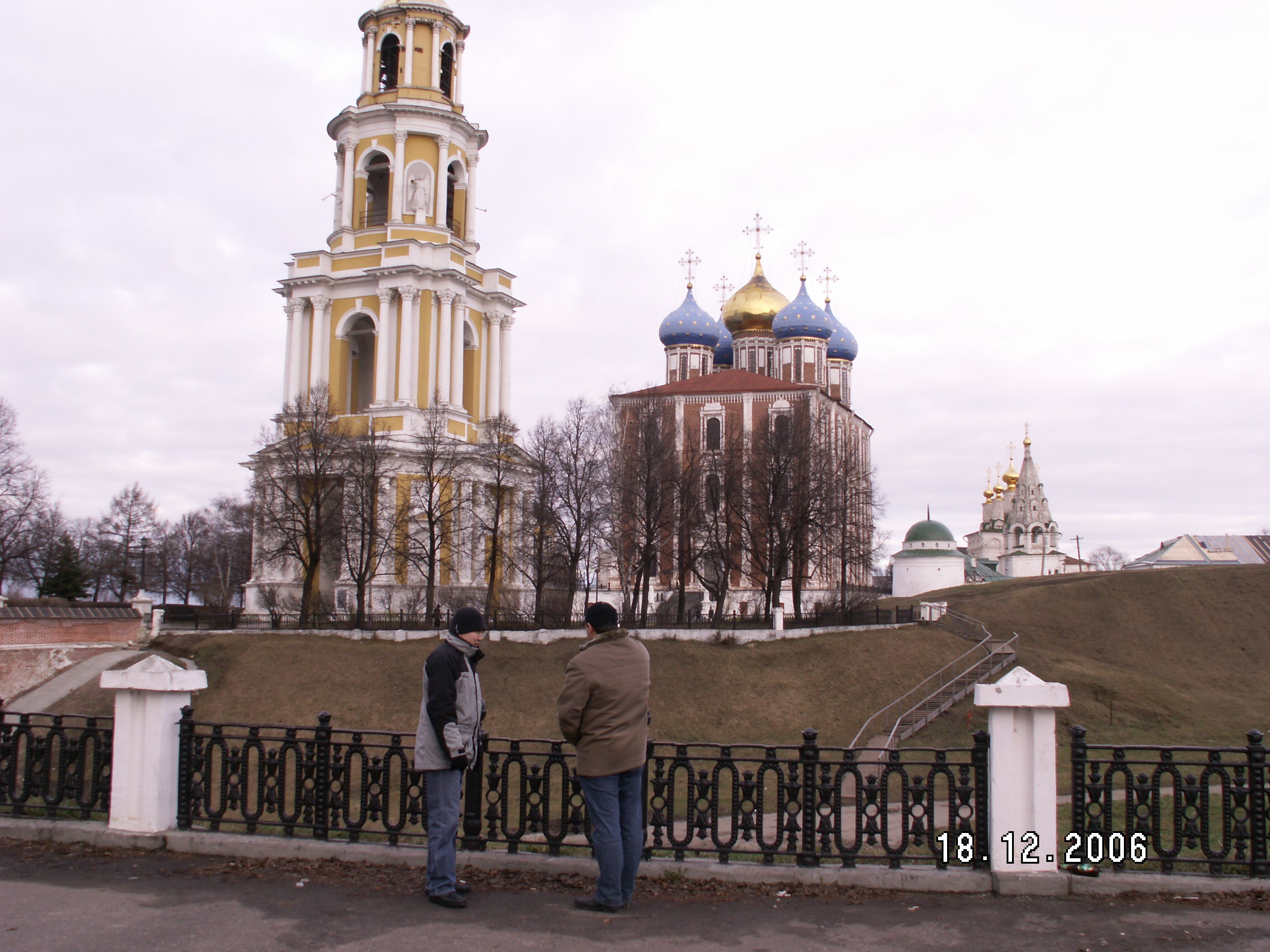 Kremlin Ryazan